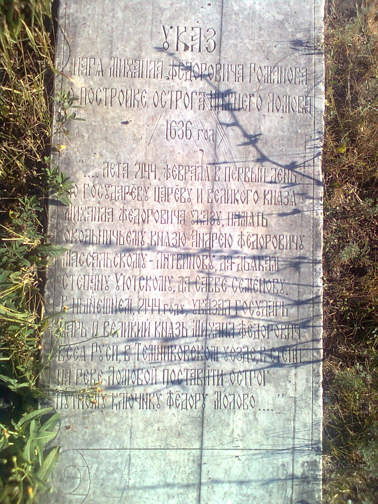 Указ о возникновении